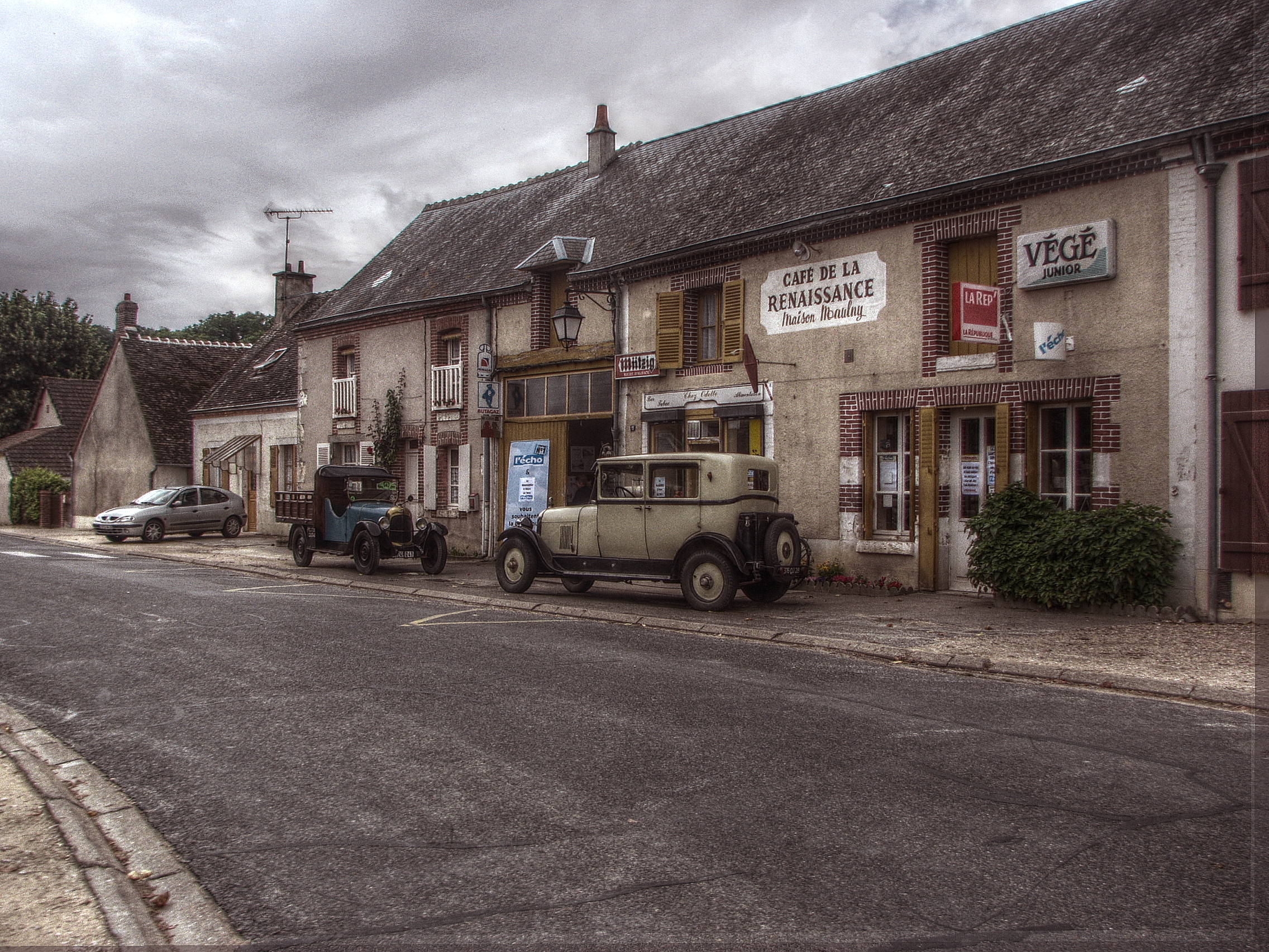 Des vieux Citroens dans la ville de Saint Hilaire sur Yerre, proche de Cloyes sur la Loir